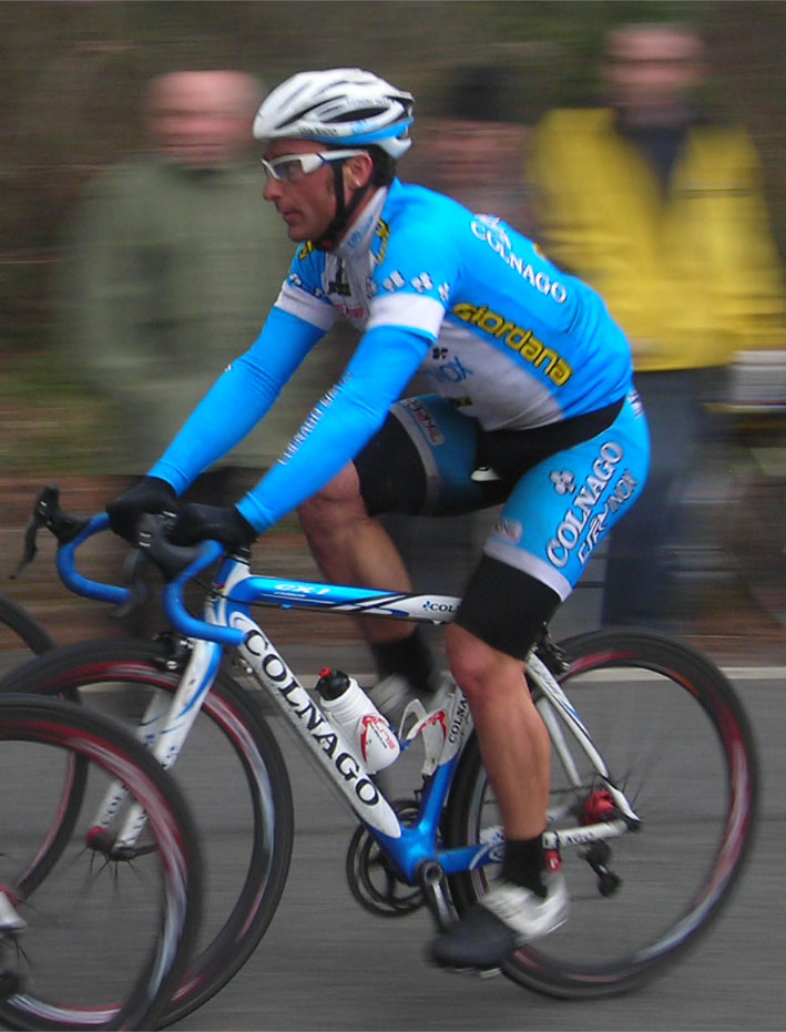 Mattia Gavazzi alla Milano-Sanremo 2010 (Salita delle Manie)